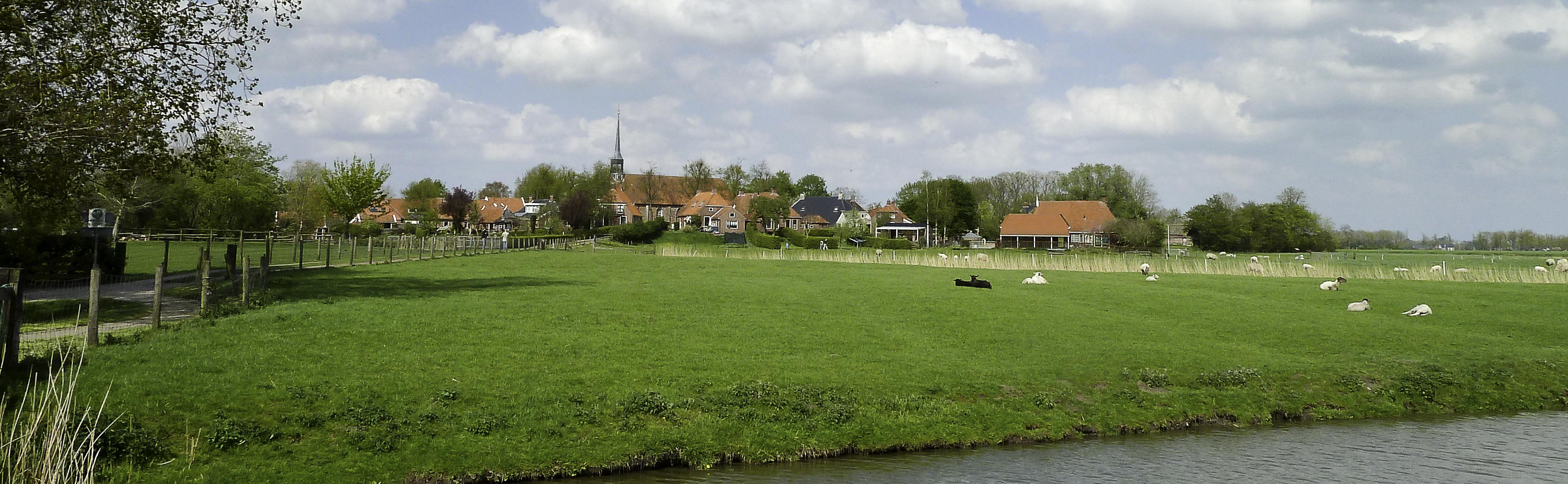 Dorpssilhouet Niehove